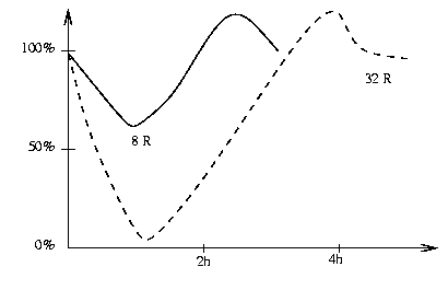 Évolution temporelle du nombre de mitoses dans les cellules de l'épithéliales de la cornée du rat lors d'une irradiation aiguë // Time evolution of the mitosis rate in epithelium cells of rats' cornea